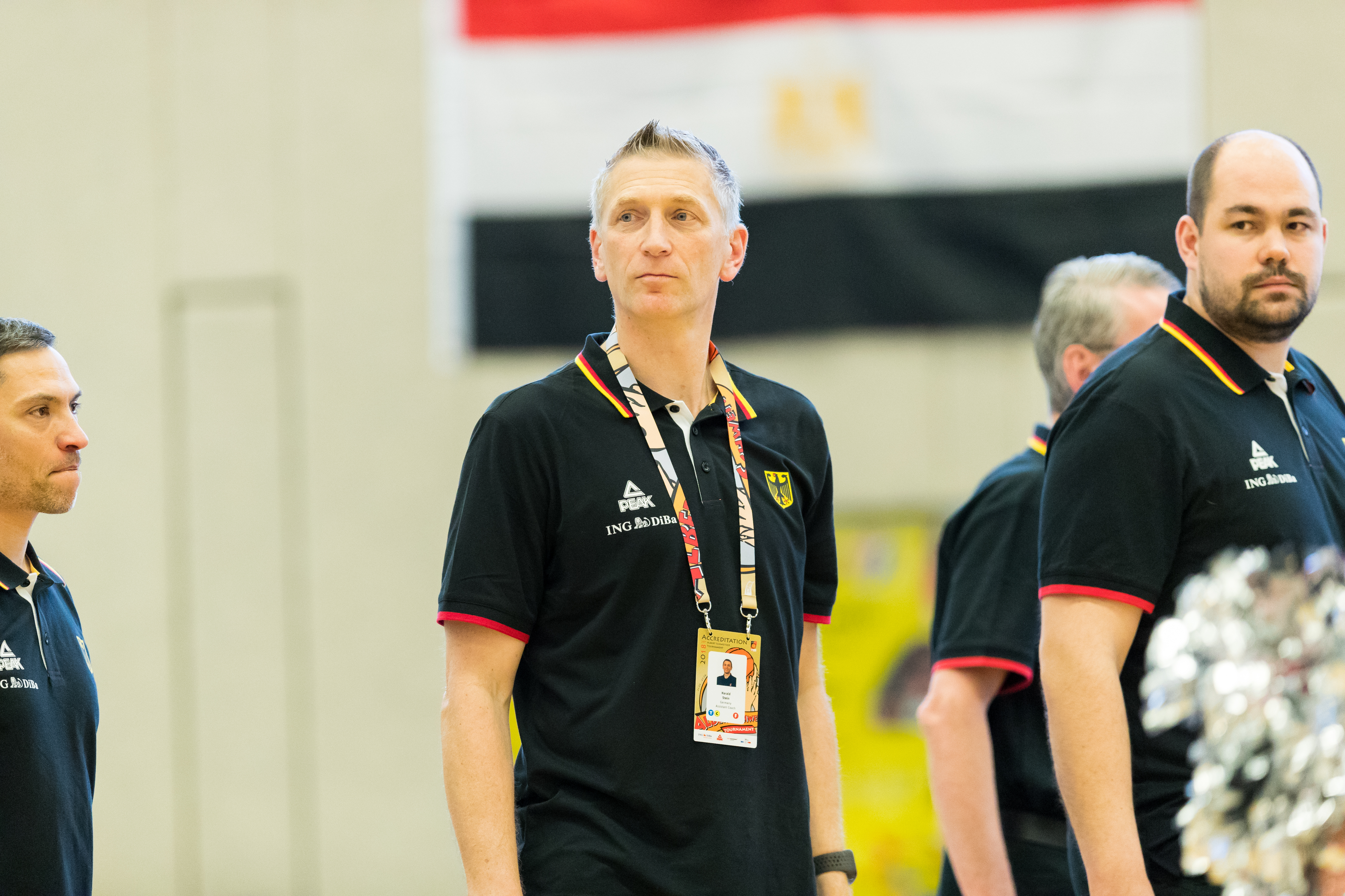 Australia vs Germany 66:88 during final Basketball Albert Schweitzer Turnier at GBG Halle, Mannheim, Baden-Württemberg, Germany on 2018-04-07, Photo: Sven Mandel